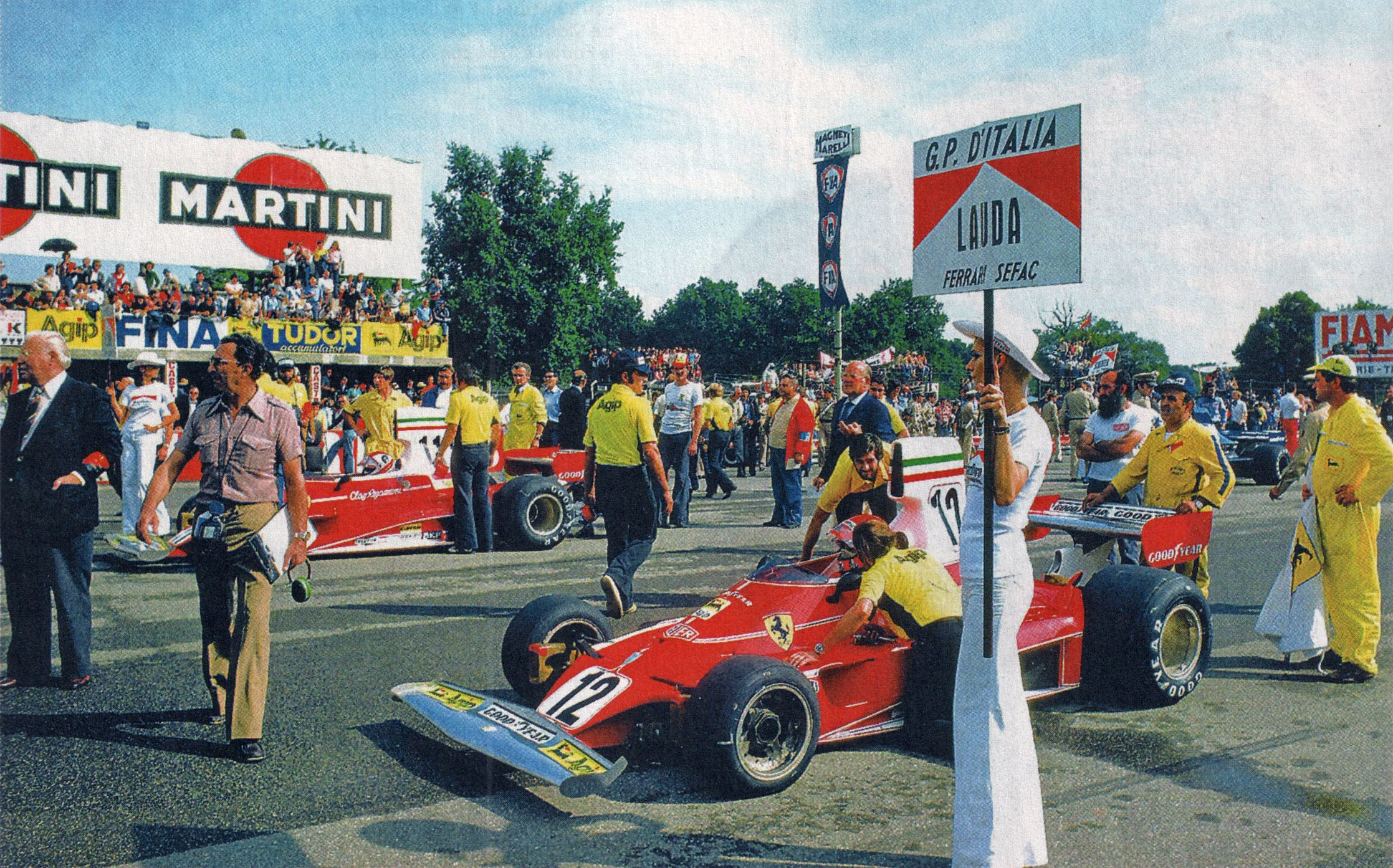 Monza, Autodromo Nazionale, 7 settembre 1975. Il pilota austriaco Niki Lauda, autore della pole position, nell'abitacolo della sua Ferrari 312T in attesa del via del XLVI Gran Premio d'Italia; alla sua destra, sulla seconda casella della griglia, il compagno di squadra, lo svizzero Clay Regazzoni.